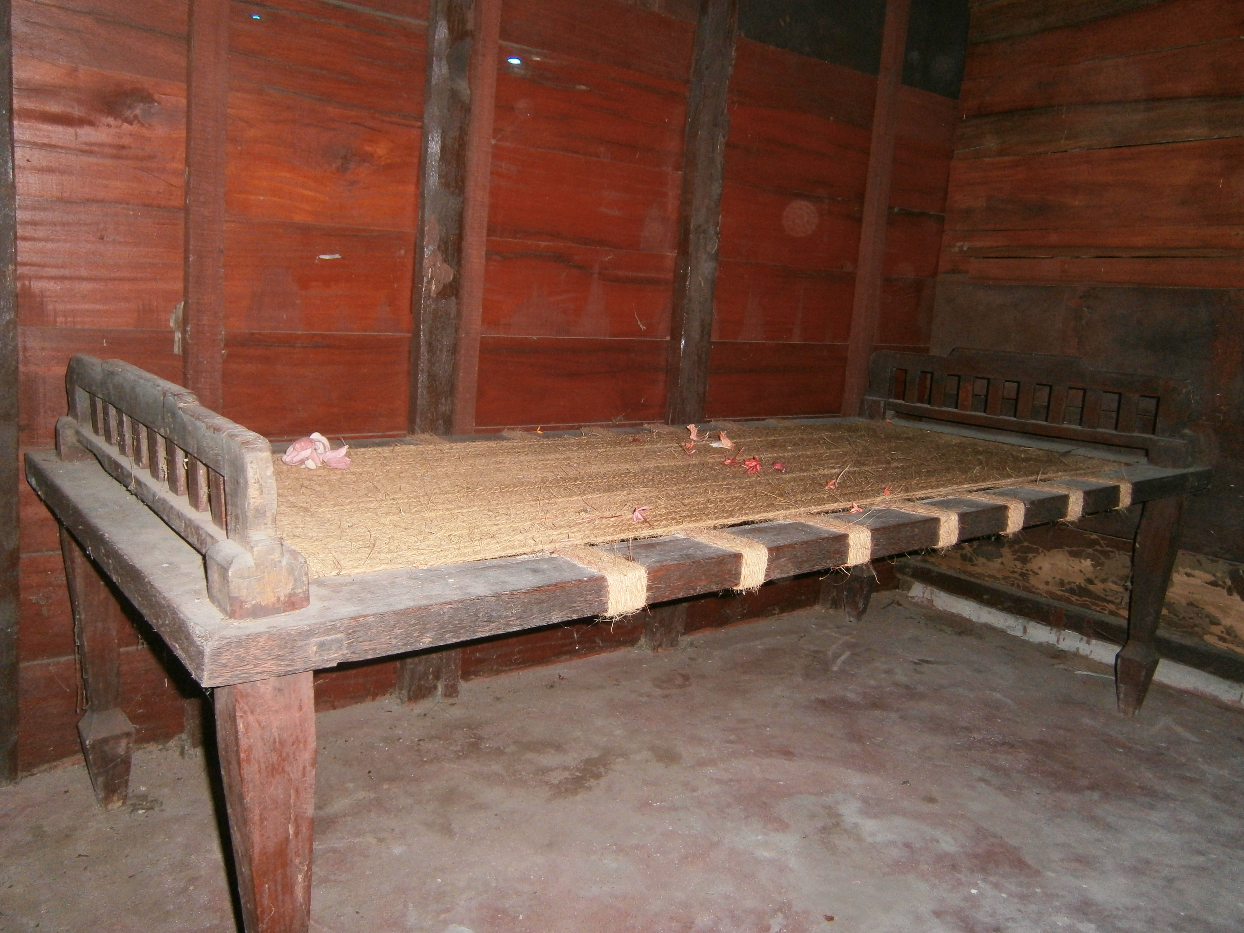 പി. കൃഷ്ണപിള്ള മരണ സമയത്ത് ഉപയോഗിച്ച കട്ടില്‍